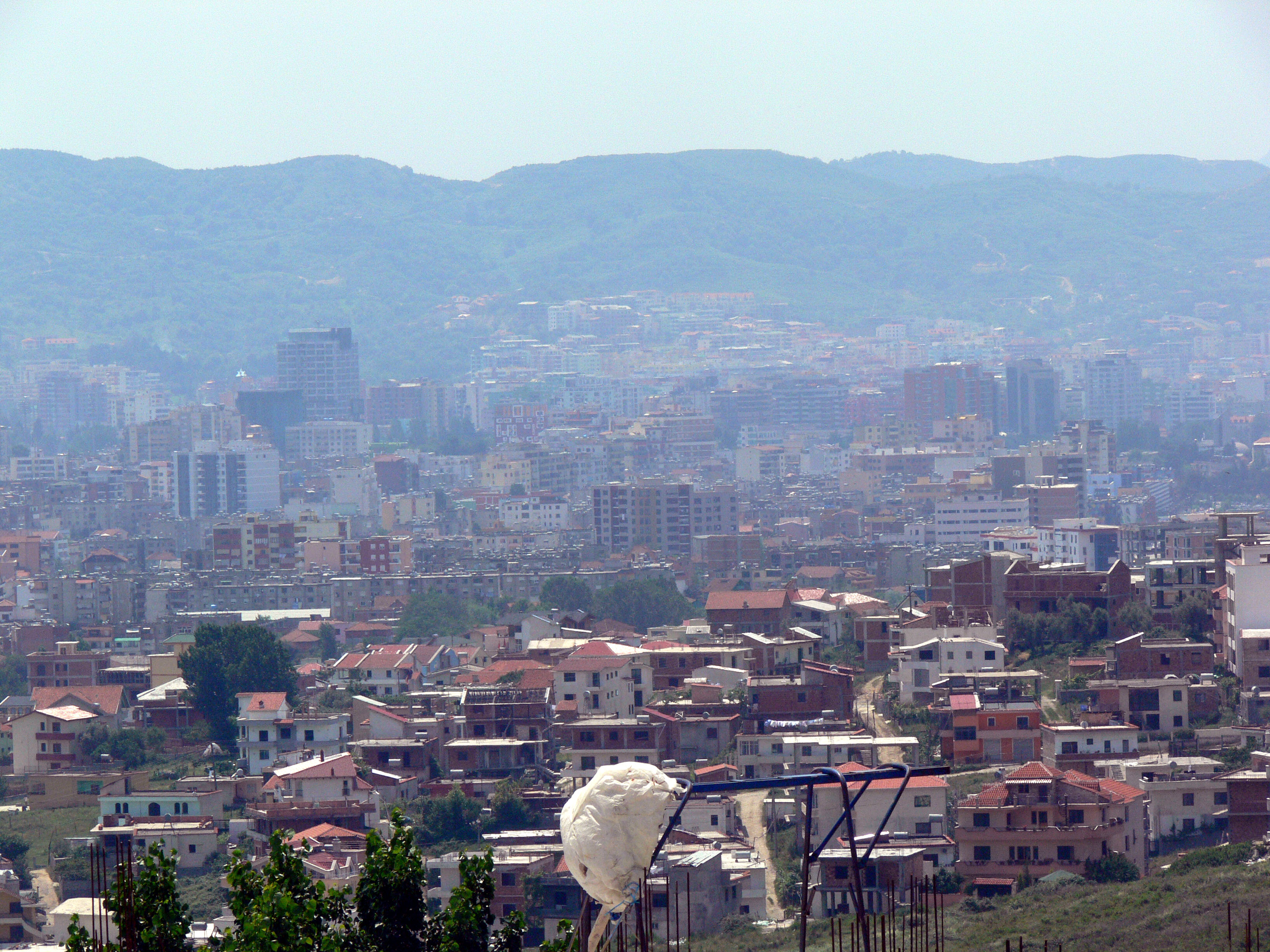 Tirana vom Chateau Linza aus.